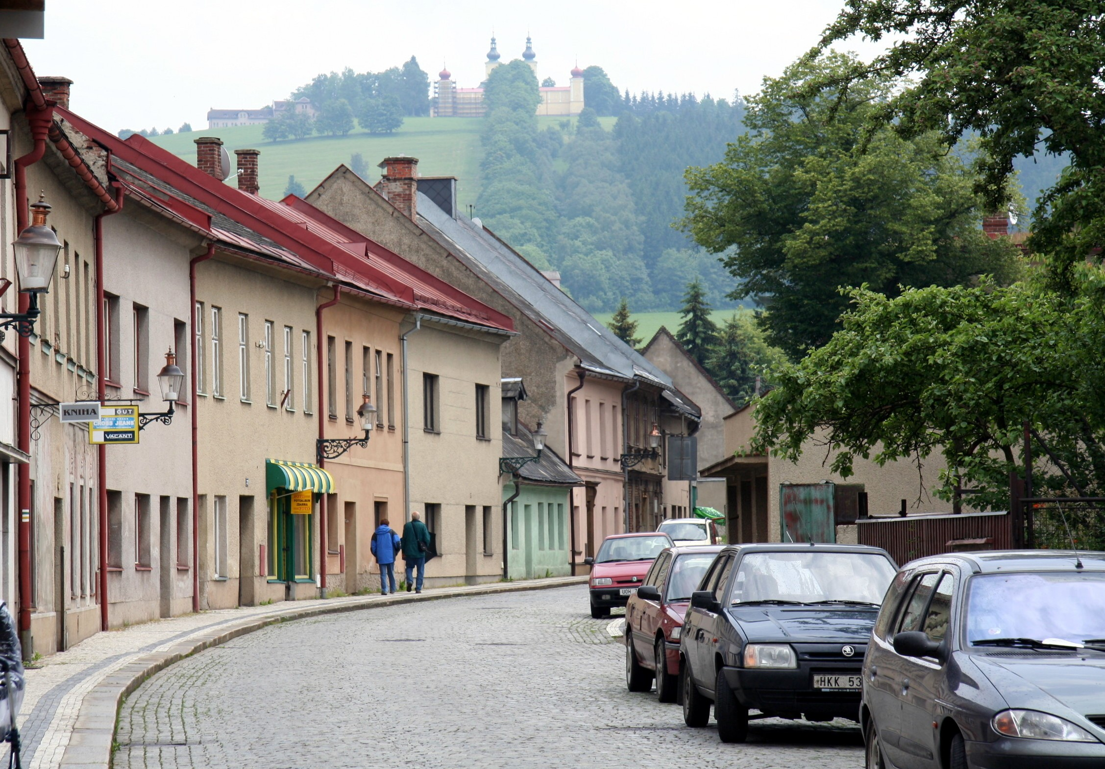 Grulich, im Hintergrund der Muttergottesberg